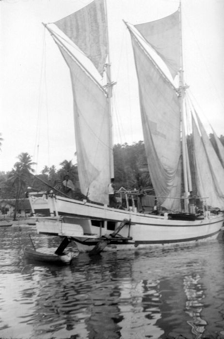 Negatief. Het Mandarse zeilschip de Padewakang bij Zuid-Celebes